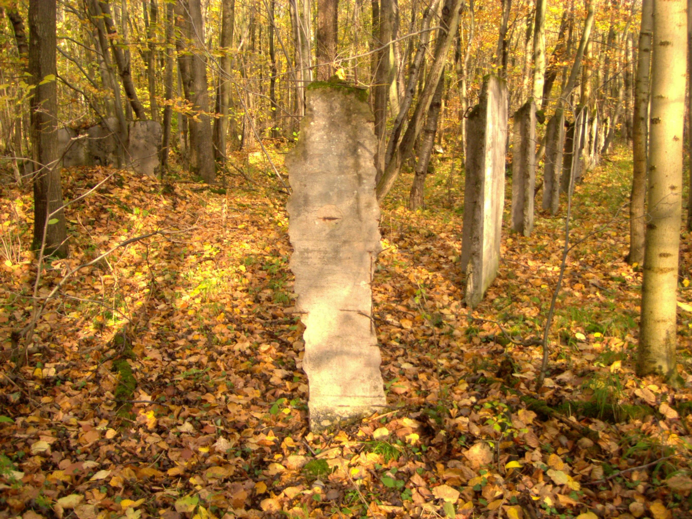 Reste der Betonmauer des im Mühlhäuser Stadtwald versteckten Rüstungsbetriebes "Gerätebau GmbH". Eigene Fotografie vom 29.10.2006.Michael Fiegle